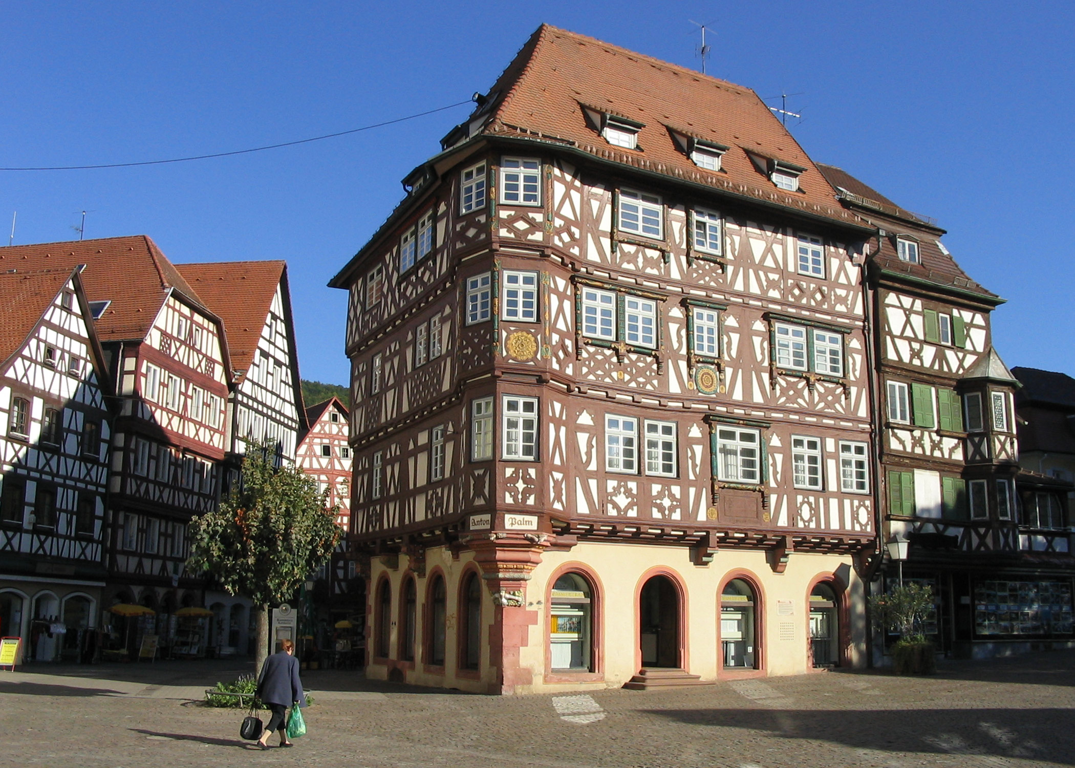 Description in de wikipedia Bildbeschreibung: Das Palmsche Haus am Marktplatz in Mosbach Quelle: eigene Aufnahme Fotograf/Zeichner: AlterVista Datum: September 2003